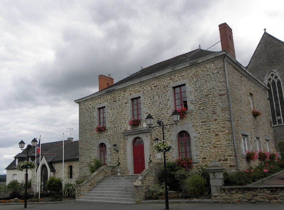 Mairie du Pertre (35).